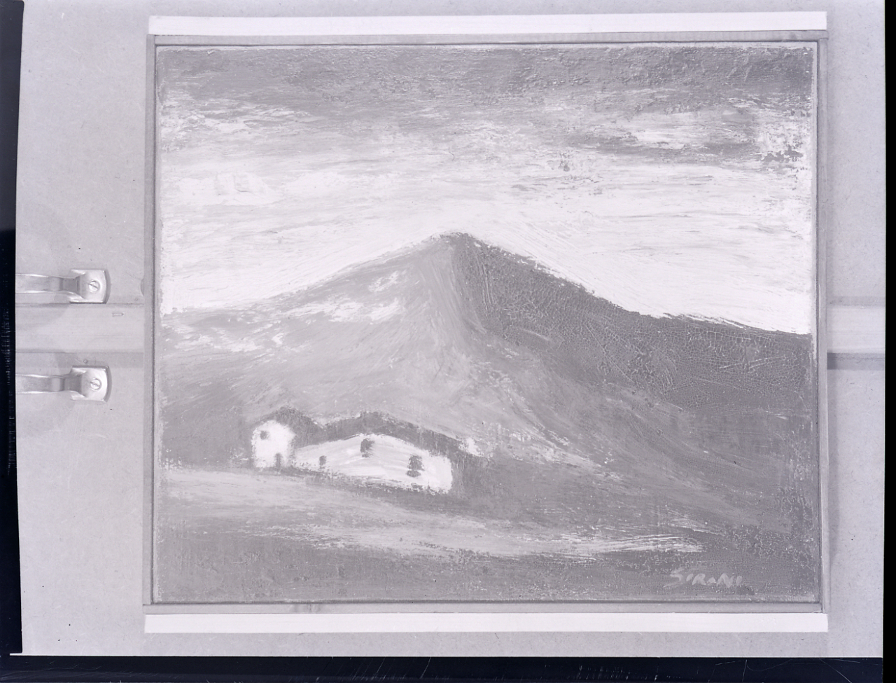 Opere d'arte. Sironi. Servizio fotografico : Italia, 1982 / Paolo Monti. - Buste: 1, Fototipi: 1 : Negativo b/n, gelatina bromuro d'argento/ pellicola ; 10x12. - ((Serie costituita da 1 busta di carta con iscrizione: "Sironi G4724". - Fonte: Rubrica di Paolo Monti: Archivio 10x12 (ultimi numerati) - dal G1 al (s.d.), presso Archivio Paolo Monti